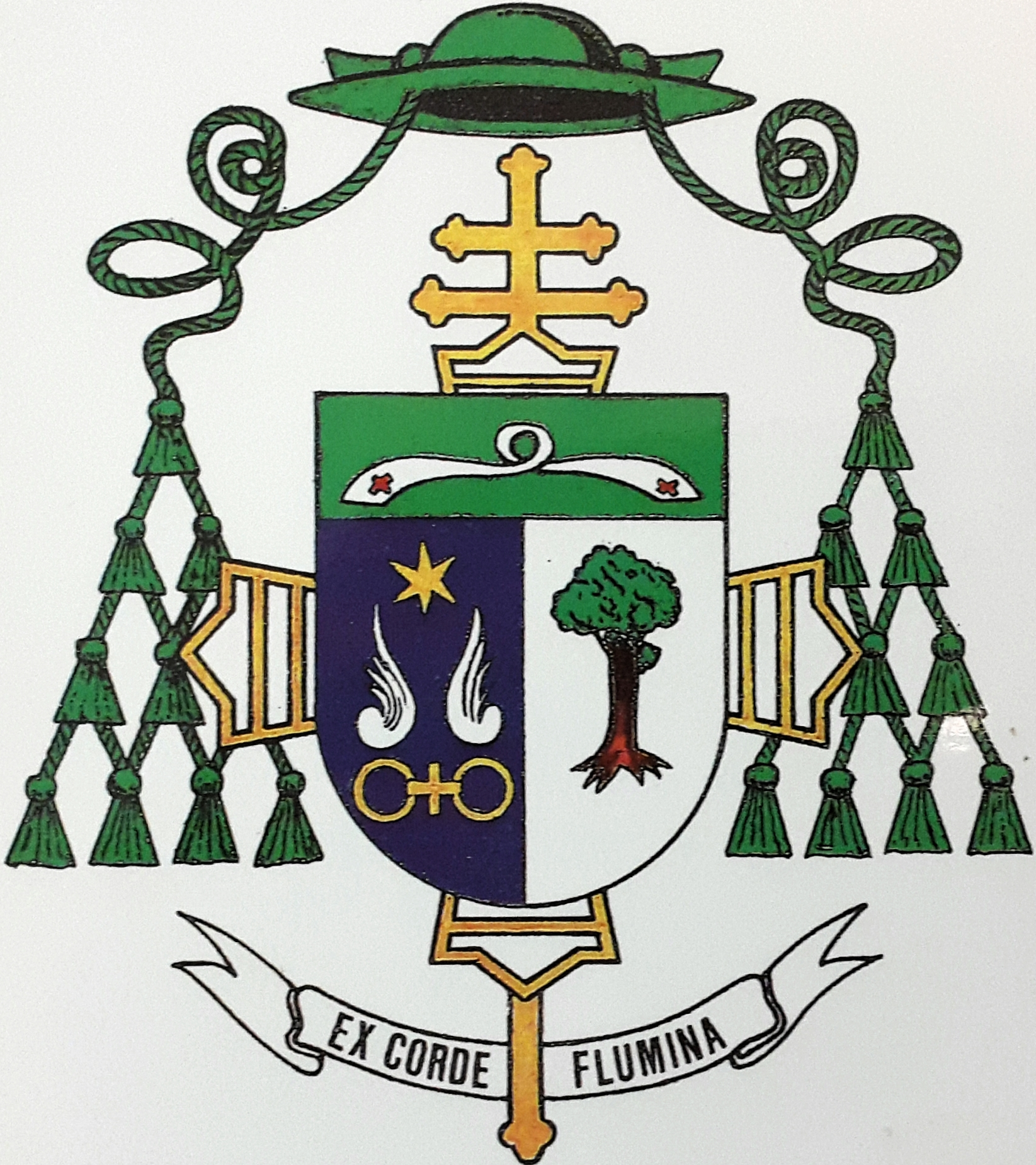 Escudo de monseñor Santiago Martínez Acebes. Obispo de Plasencia y arzobispo de Burgos.